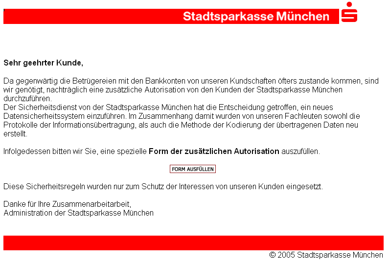 Phishing-E-Mail mit Sparkassenaussehen